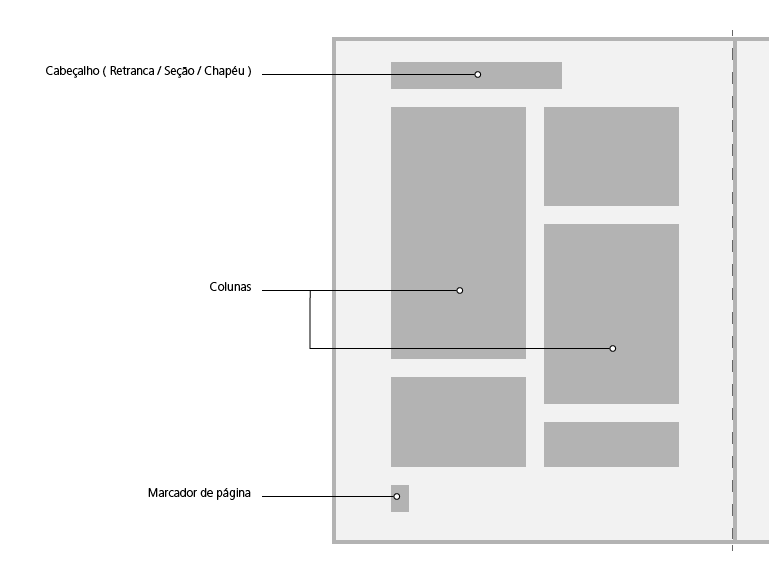 Esquema de explicação do Grid/Malha de Colunas, muito utilizado na diagramação de Revistas e Periódicos.